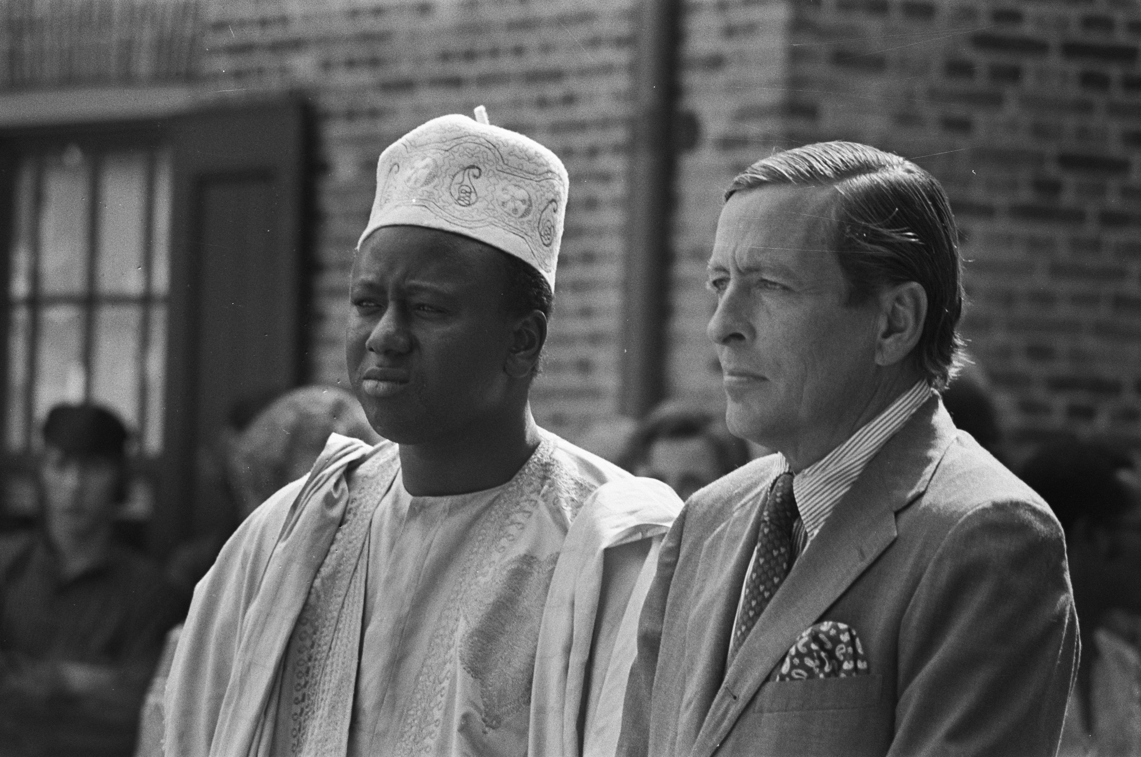 Collectie / Archief : Fotocollectie Anefo Reportage / Serie : Prins Claus geeft het startsein voor de aktie "Graan doet leven" t.b.v. Gambia Beschrijving : Ebou Momar Taal en Prins Claus Datum : 19 augustus 1975 Locatie : Overijssel, Raalte Trefwoorden : akties, diplomaten, ontwikkelingssamenwerking, portretten, prinsen, voedselhulp Persoonsnaam : Claus, prins, Momar Taal, Ebou Fotograaf : Fotograaf Onbekend / Anefo Auteursrechthebbende : Nationaal Archief Materiaalsoort : Negatief (zwart/wit) Nummer archiefinventaris : bekijk toegang 2.24.01.05 Bestanddeelnummer : 928-1104